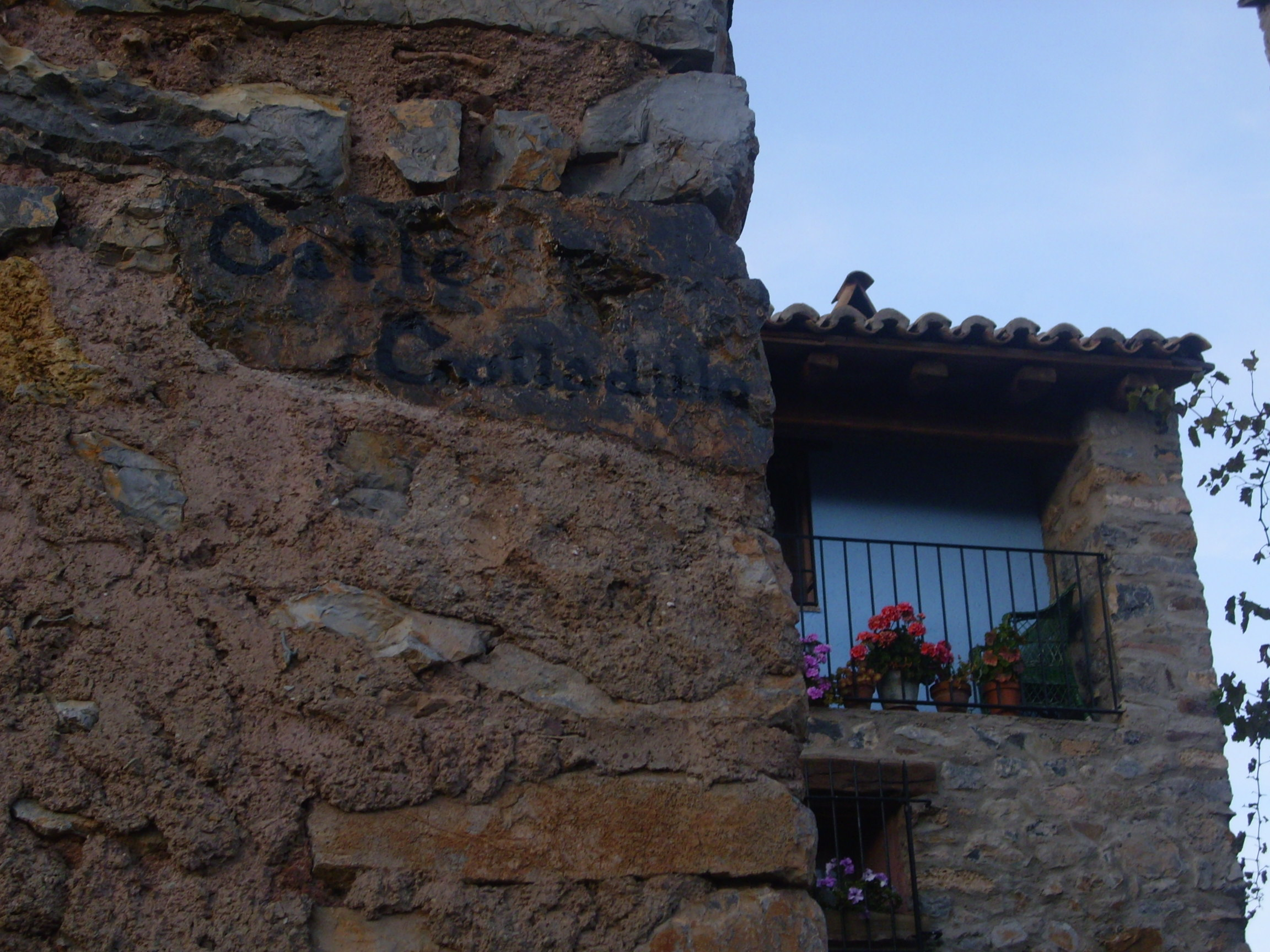 Detalle de arquitectura tradicional.